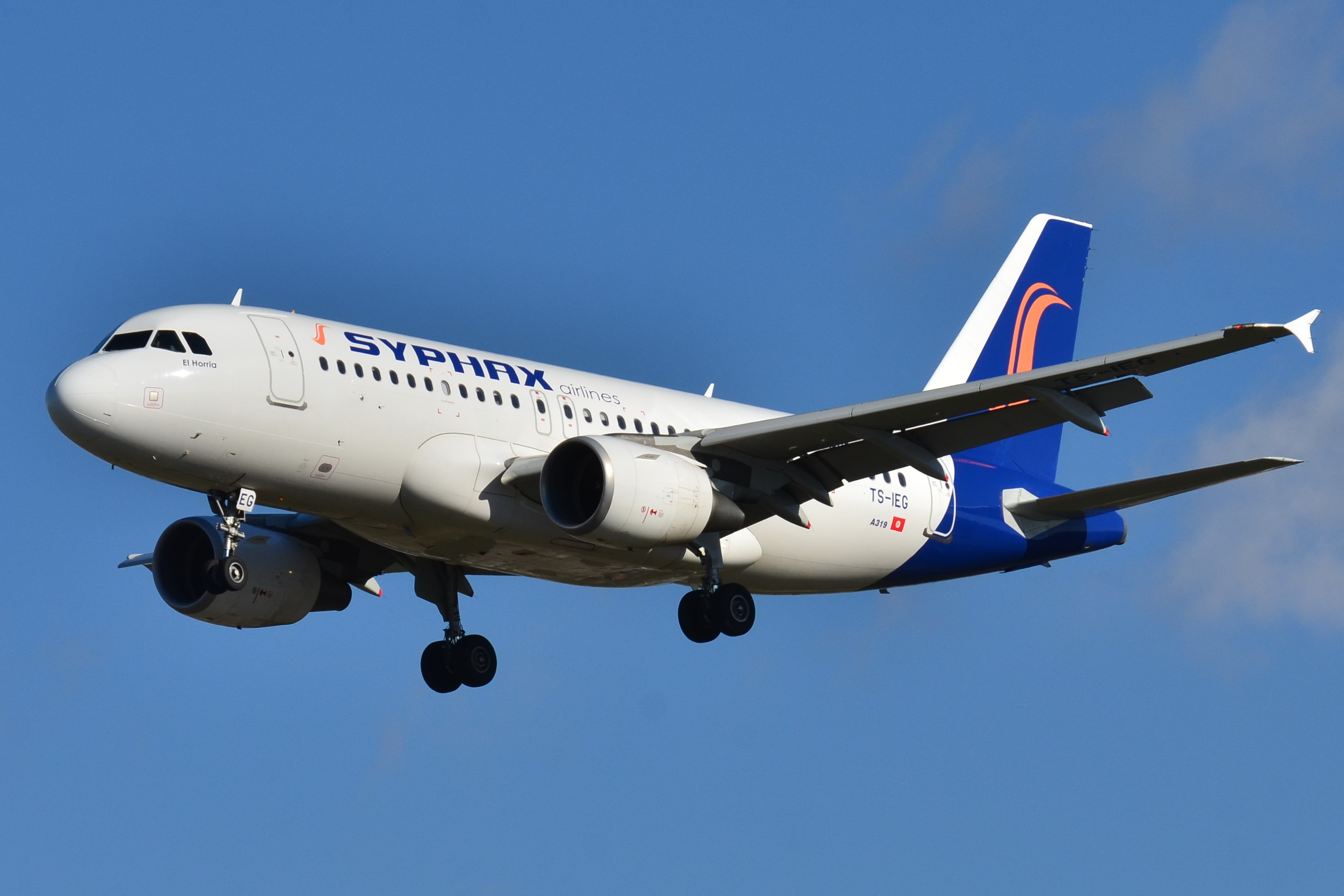 Photo prise à l'aéroport de Toulouse-Blagnac (LFBO) en France. Picture take at Toulouse-Blagnac Airport (LFBO) in France.